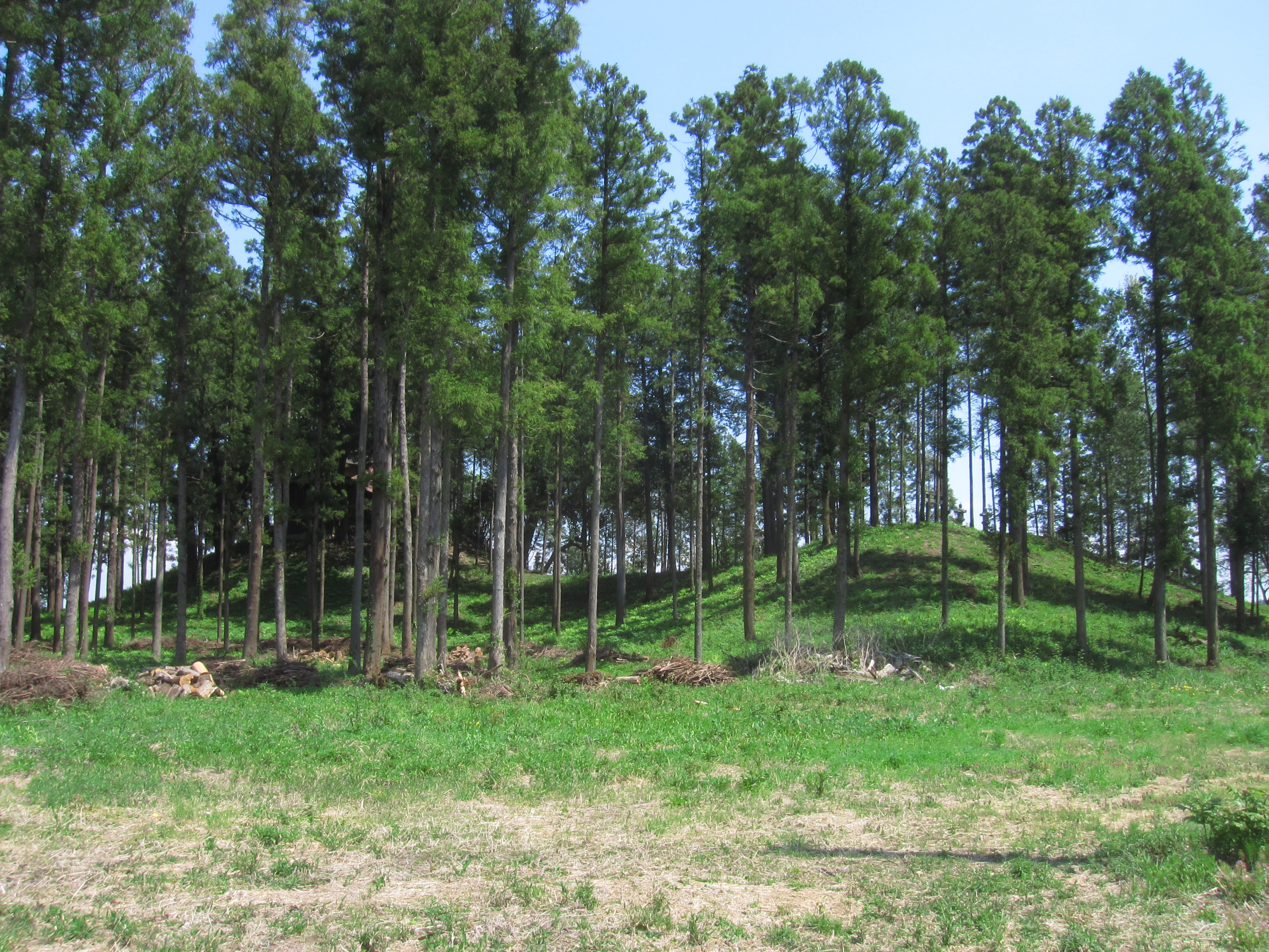 摩利支天塚古墳 全景